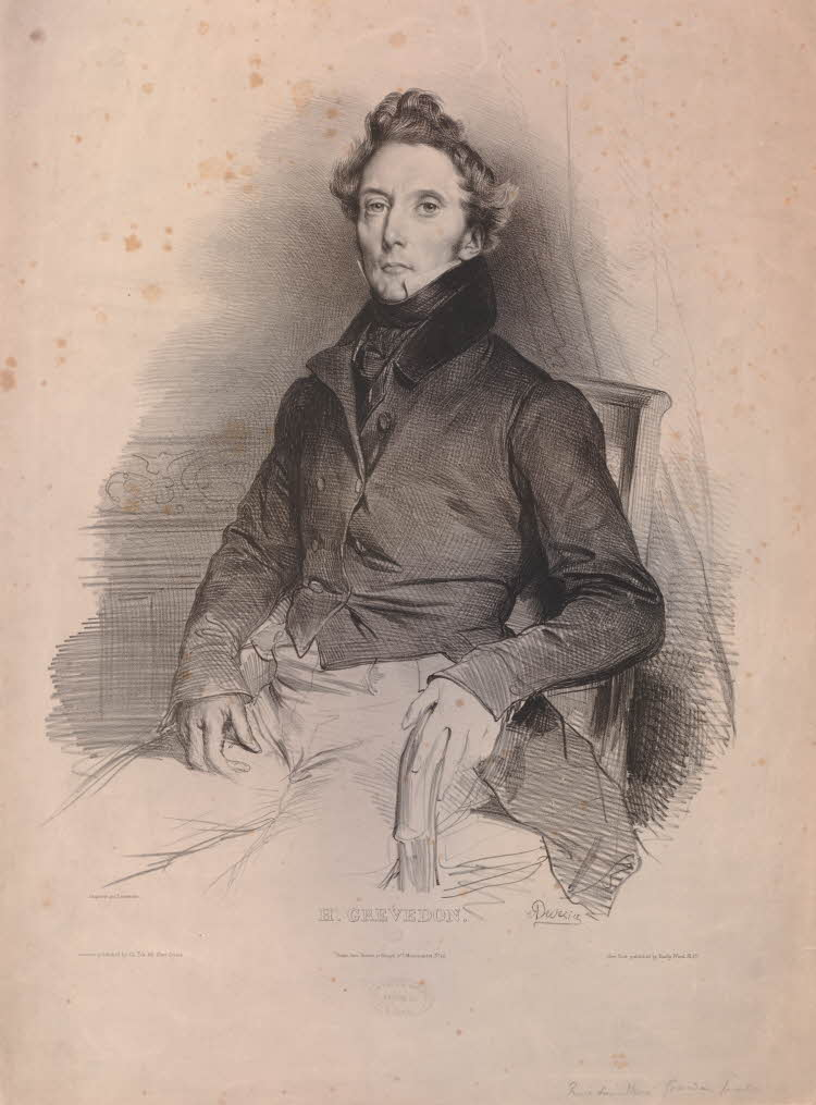 Achille Devéria (1800-1857), Henri Grévedon, lithographie.